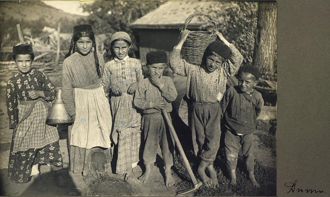 Дубровский М.И. Дети. Татары крымские. Крым Республика, городской округ Алушта, пос. Изобильное (д. Корбеклы), июль-август 1908 г